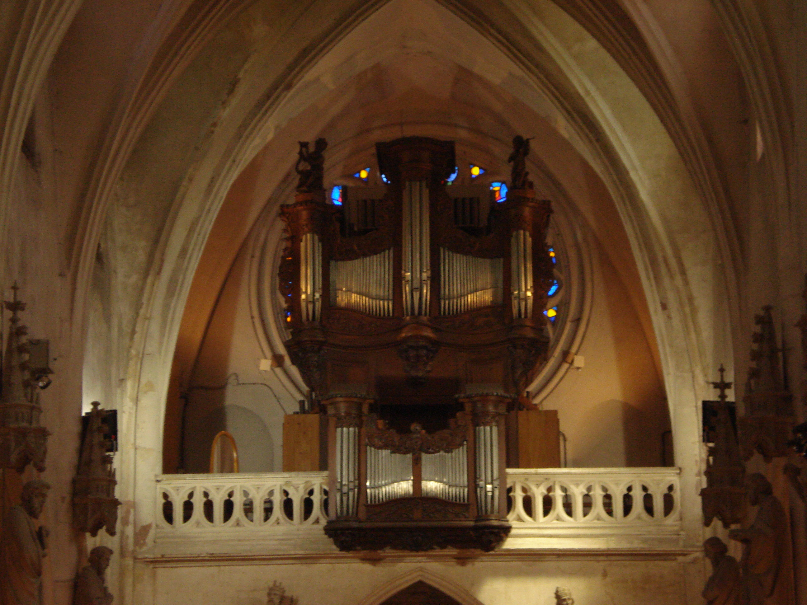 Orgue Jean-Adam Dingler, construit au XVIIIe siècle, transformé au XIXe, et restauré par Kern en 2000, en l'église de Blâmont (Lorraine).